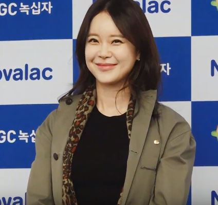 가수 백지영이 28일 오후 서울 강남구 역삼동 르메르디앙 호텔에서 열린 노발락 골드 런칭행사에 참석했다.